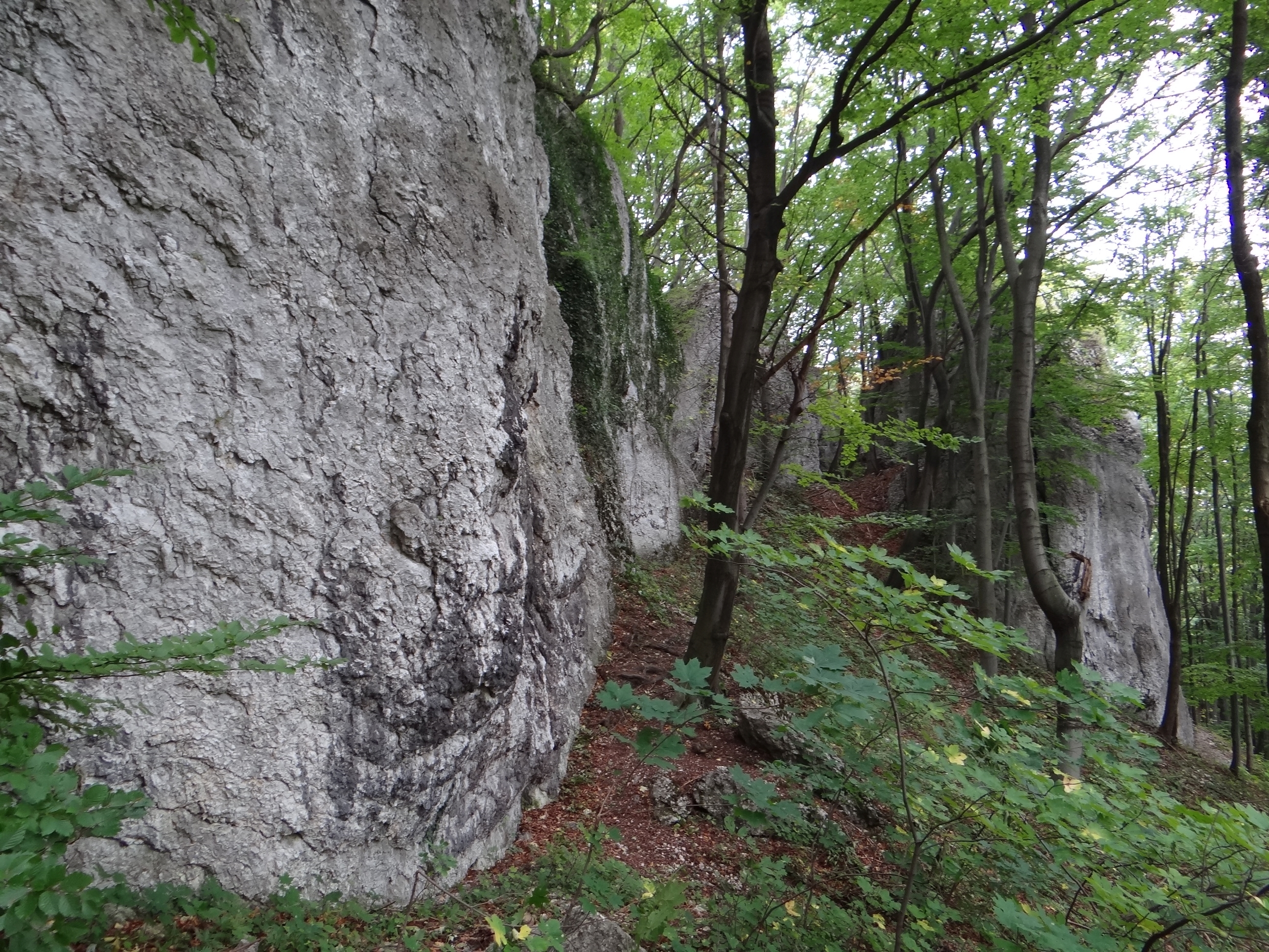 Skały Gęsiarnia w Dolinie Będkowskiej